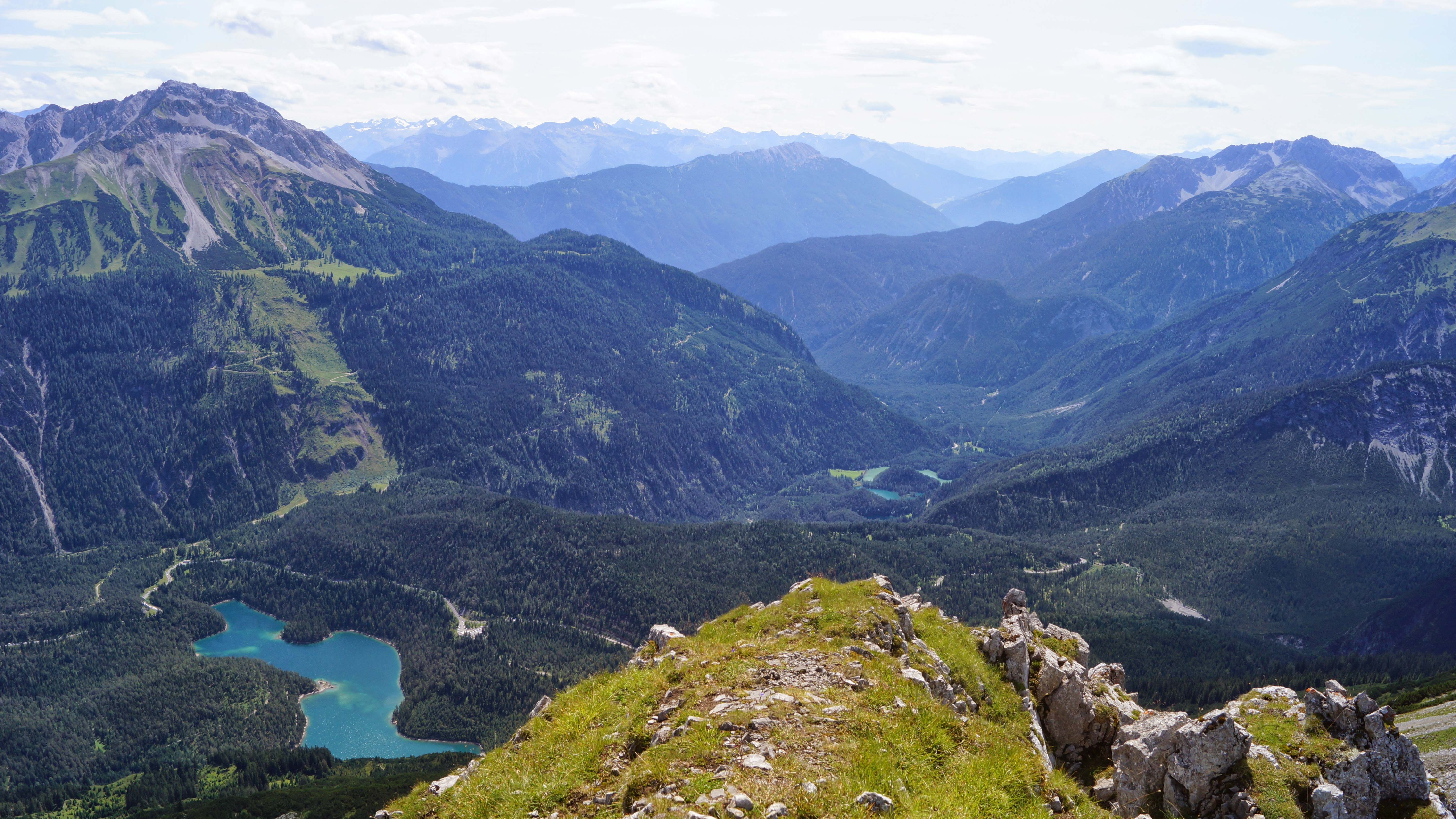 Wir schauen vom Grubigstein nach Süden über den Fernpass.